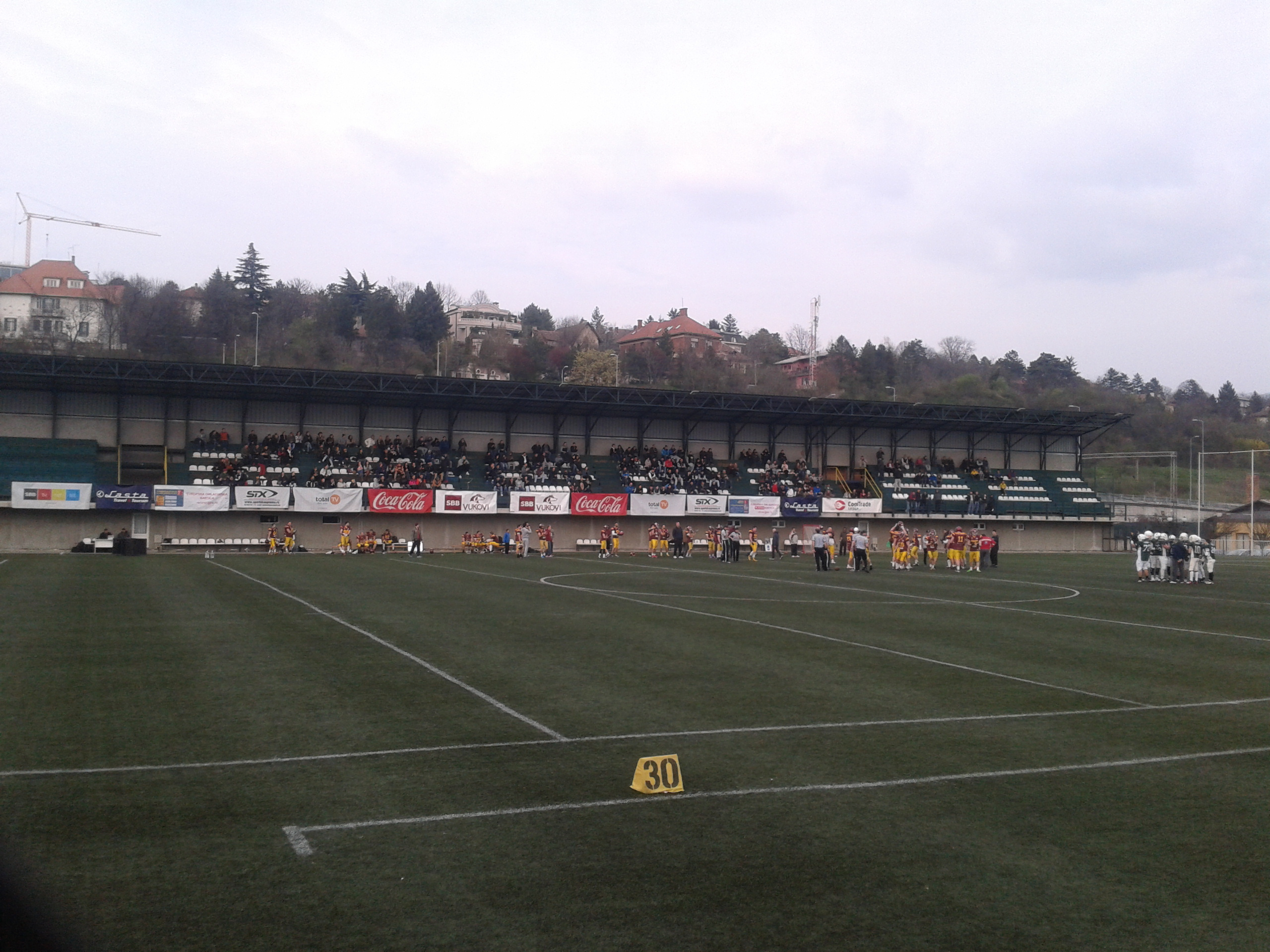 Српски (ћирилица): Вукови - Легионари (ПЛС 2016)